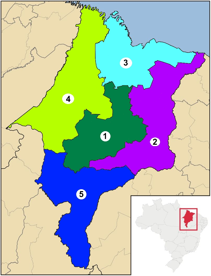 Mesorregões do estado de Maranhão Тоҷикӣ: Харитаи тақсимоти Иёлоти Мараняни Бразилизия ба мезорегионҳо